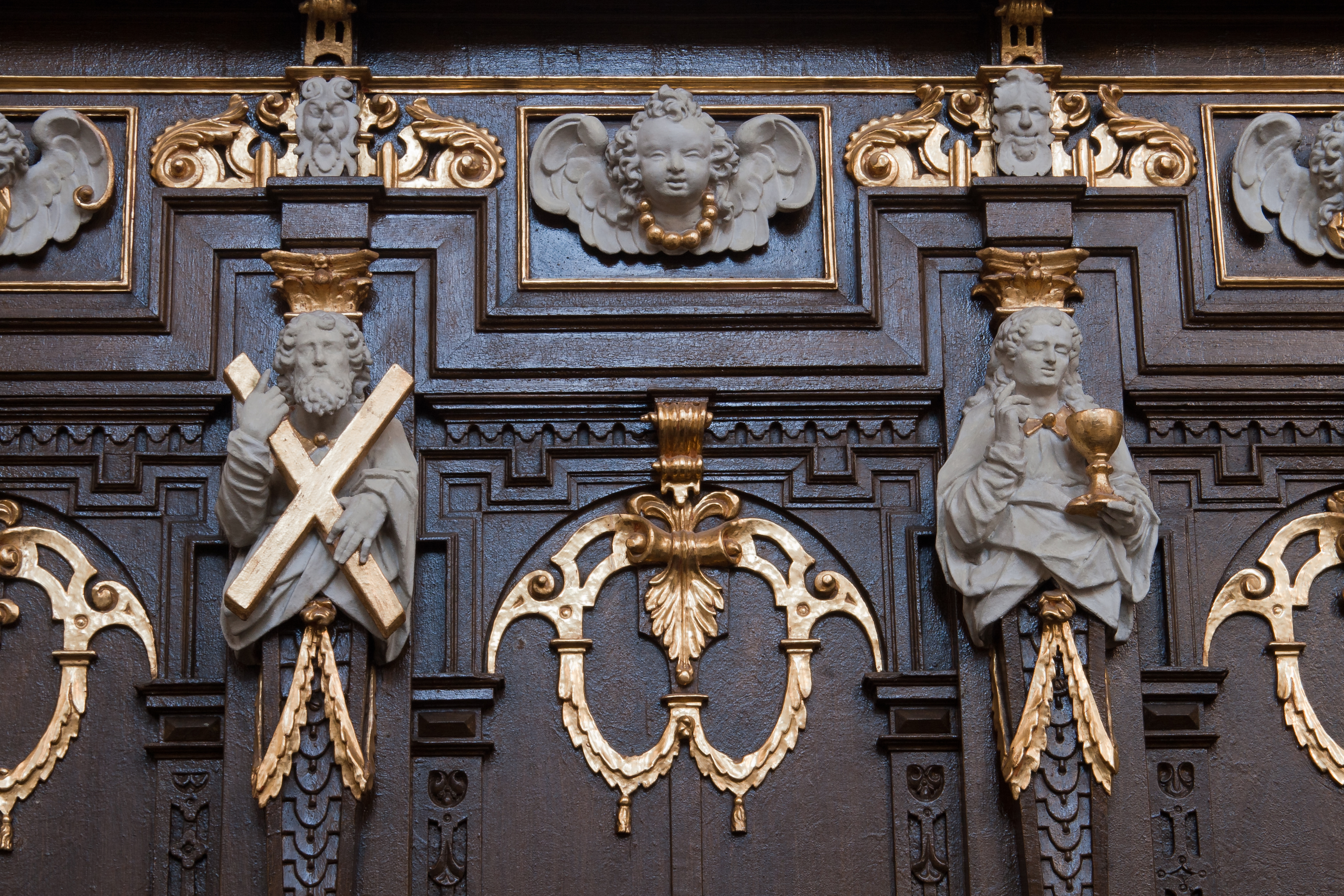 Kloster Roggenburg, Kreis Neu-Ulm, Bavaria, Germany